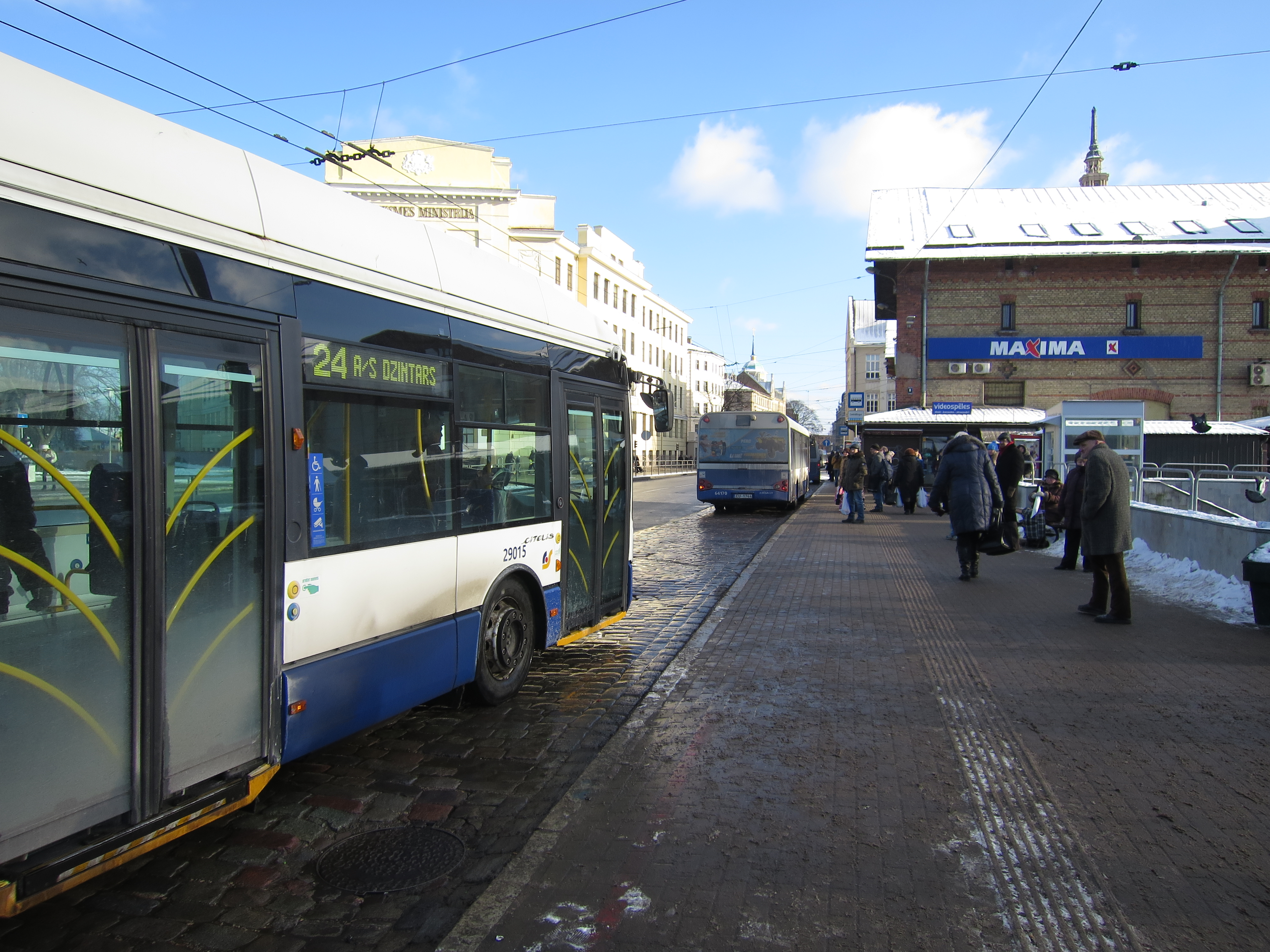 24. trolejbuss pienāk Centrāltirgus pieturā